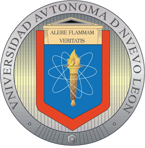 Logo de la Universidad Autónoma de Nuevo León